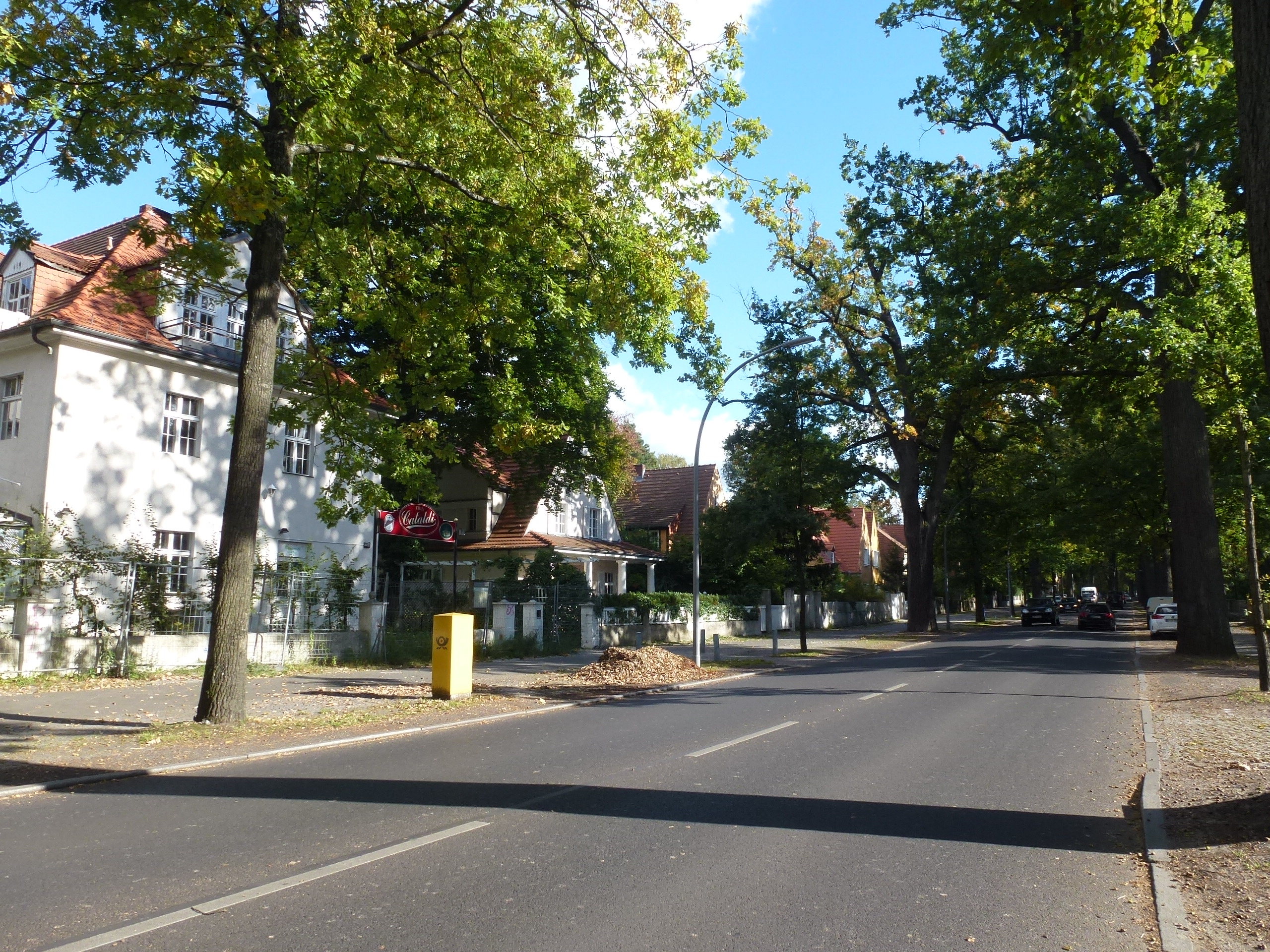 Berlin-Frohnau Oranienburger Chaussee